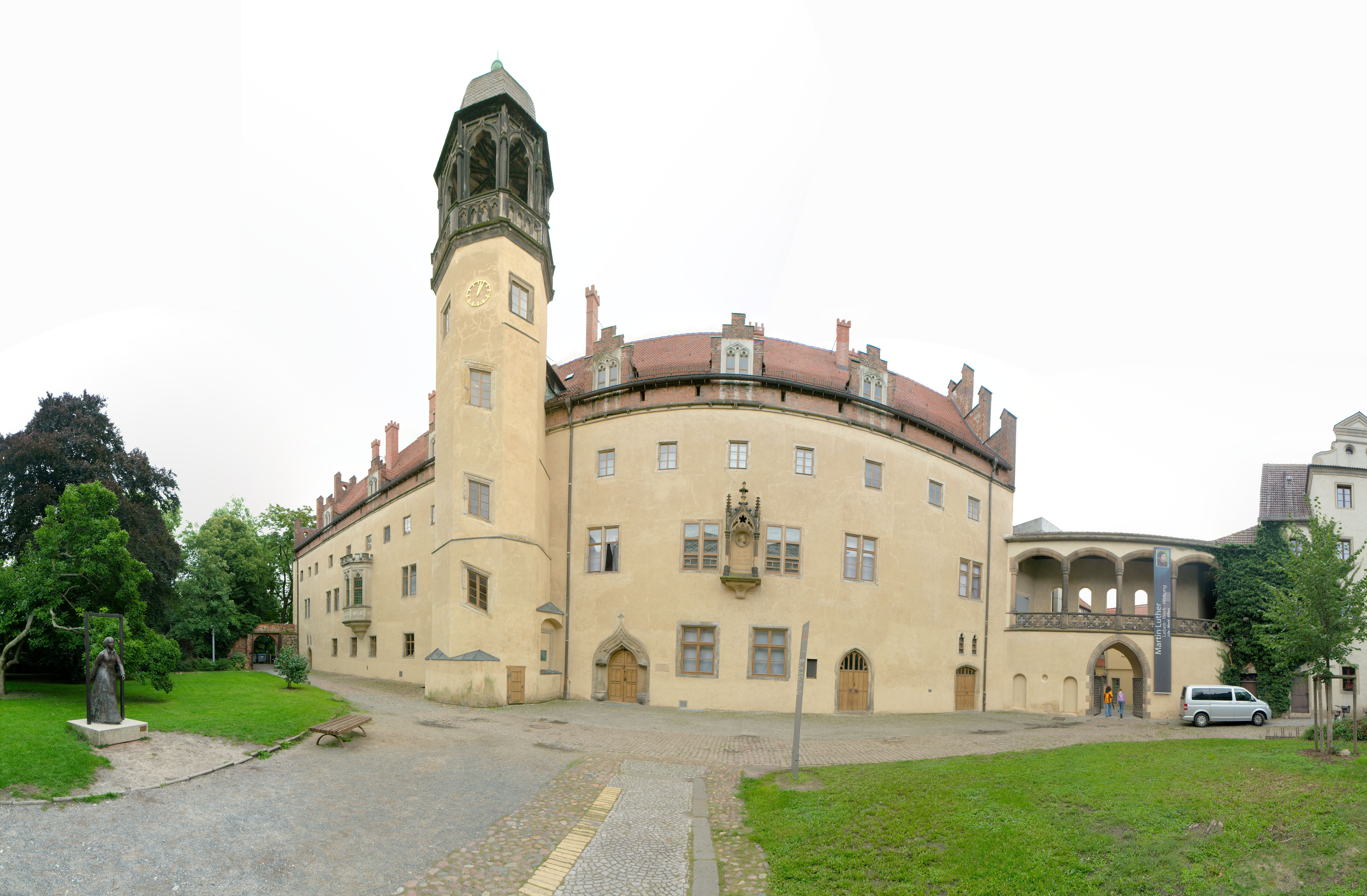 Lutherhaus